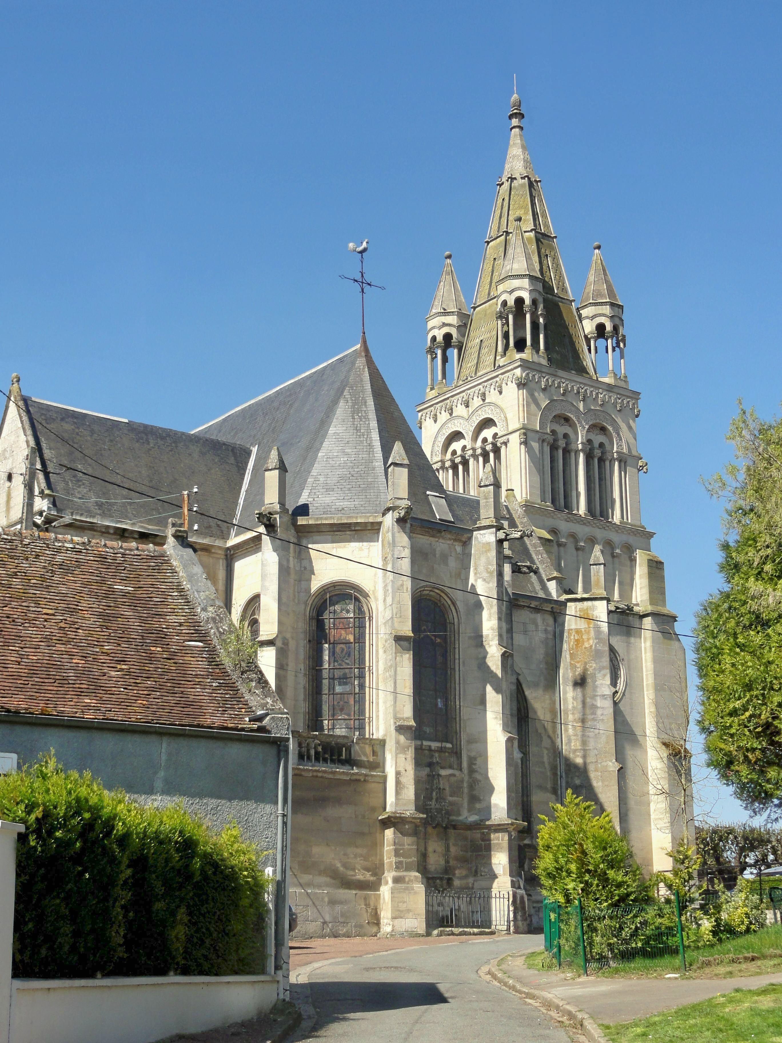 Vue sur le chevet.